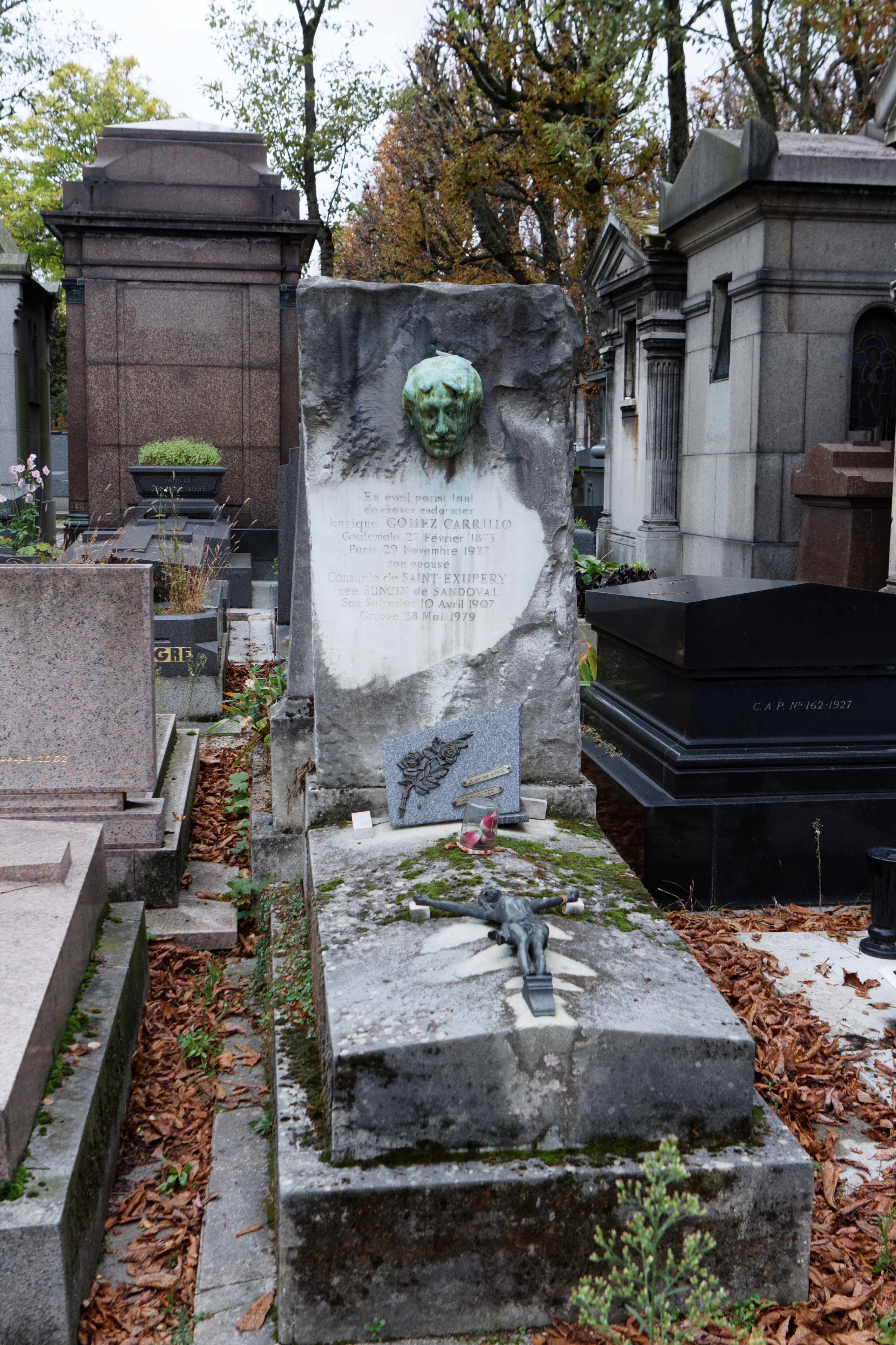 Sépulture d'Enrique Gómez Carrillo (1873-1927), critique littéraire, écrivain, journaliste et diplomate guatémaltèque ; Consuelo de Saint-Exupéry (1901-1979), personnalité salvadorienne. Elle épouse d'Enrique Gómez Carrillo en secondes noces, puis d'Antoine de Saint-Exupéry.